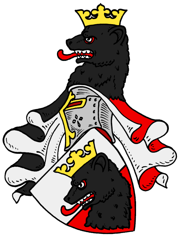 Wappen derer von Buchwaldt